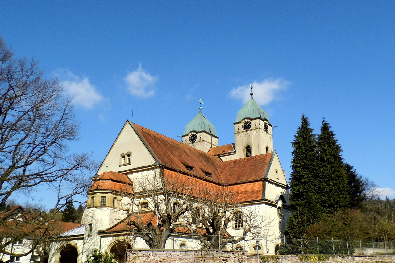 Baden-Baden-Lichtental-Lutherkirche